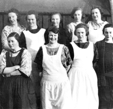 Rorbukokker i Nordøyan ca 1920. Ukjent fotograf. Unknown source: "Kystmuseet i Nord-Trøndelag"!